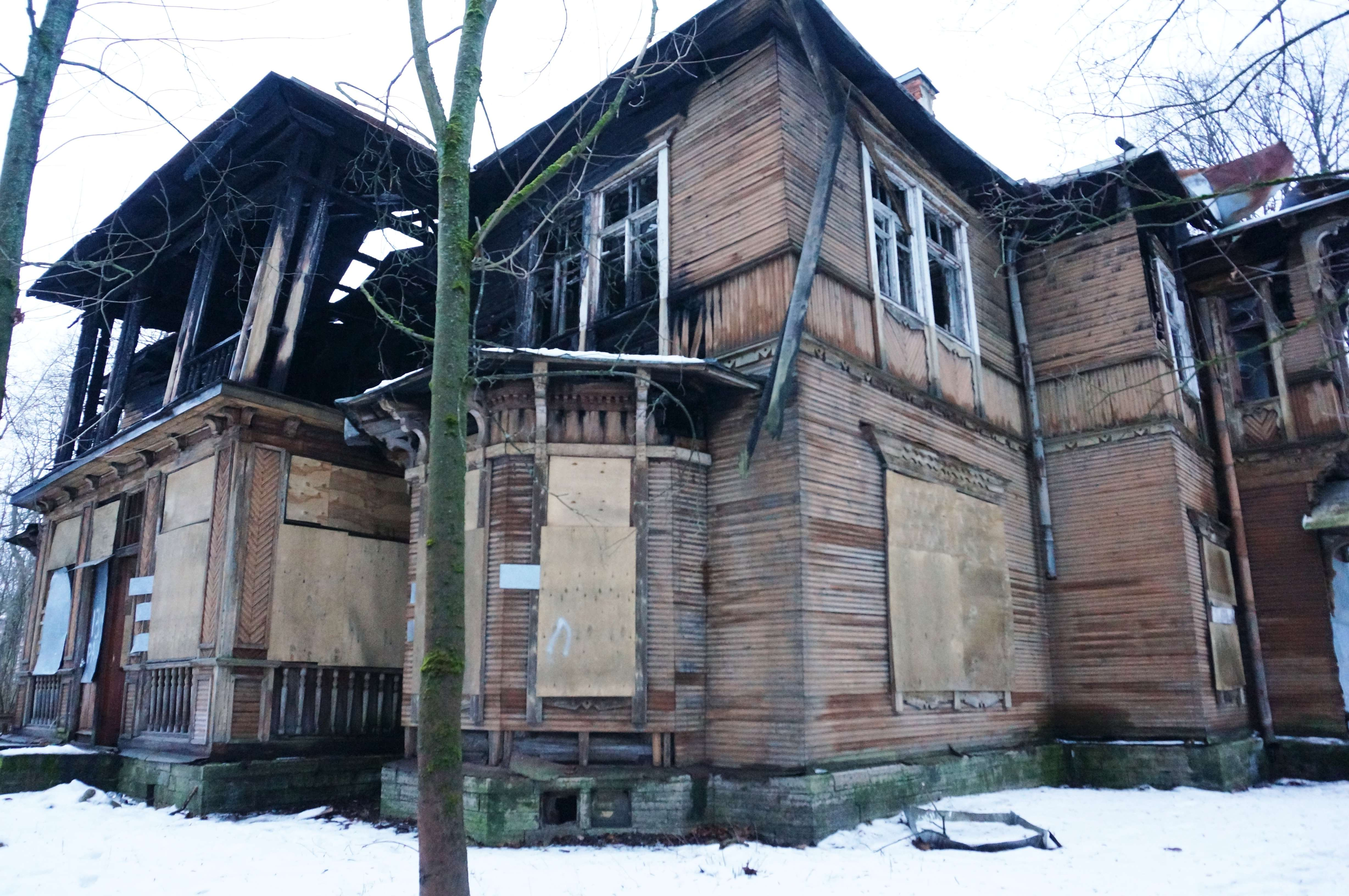 Дача Ростовцевой после пожара 2013 северное крыло